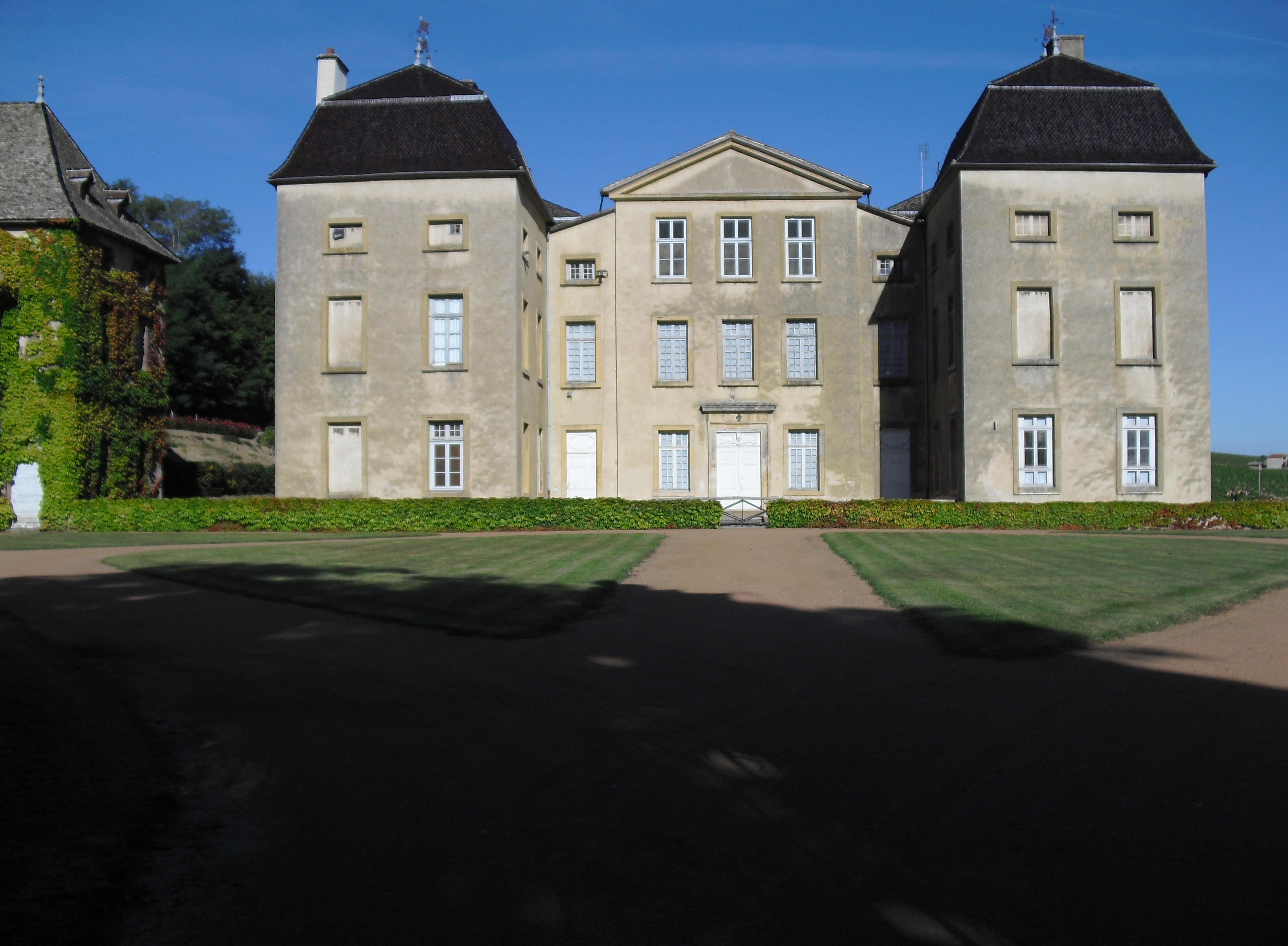 Photo du Château de la Roche - Commune de Jullié (Rhône) France